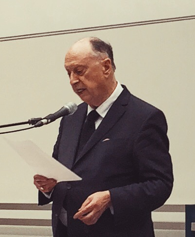 Hugo de Schepper